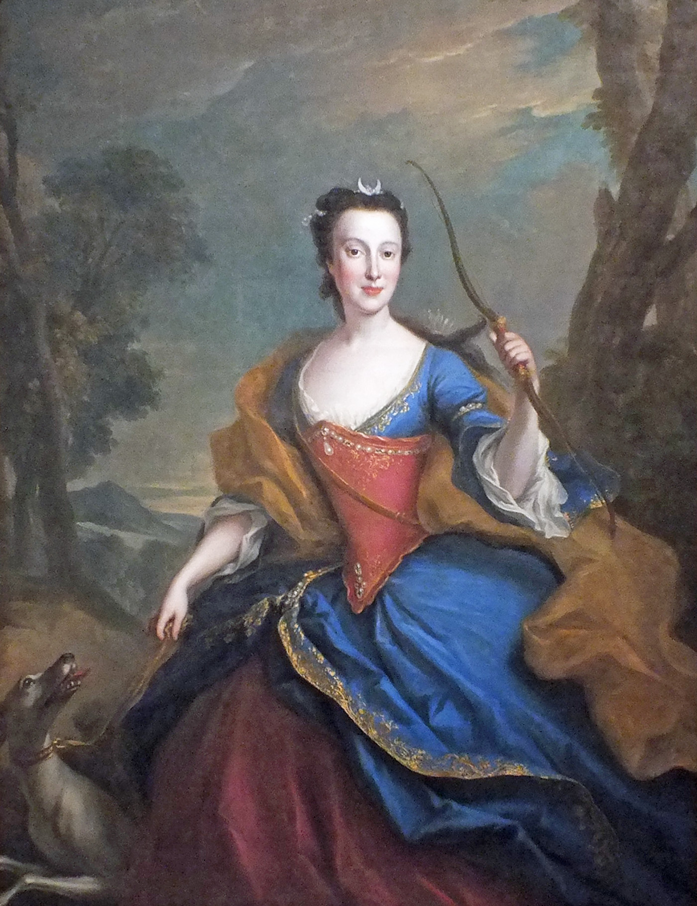 Prinzessin Maria Anna von Sachsen als Jagdgöttin Diana